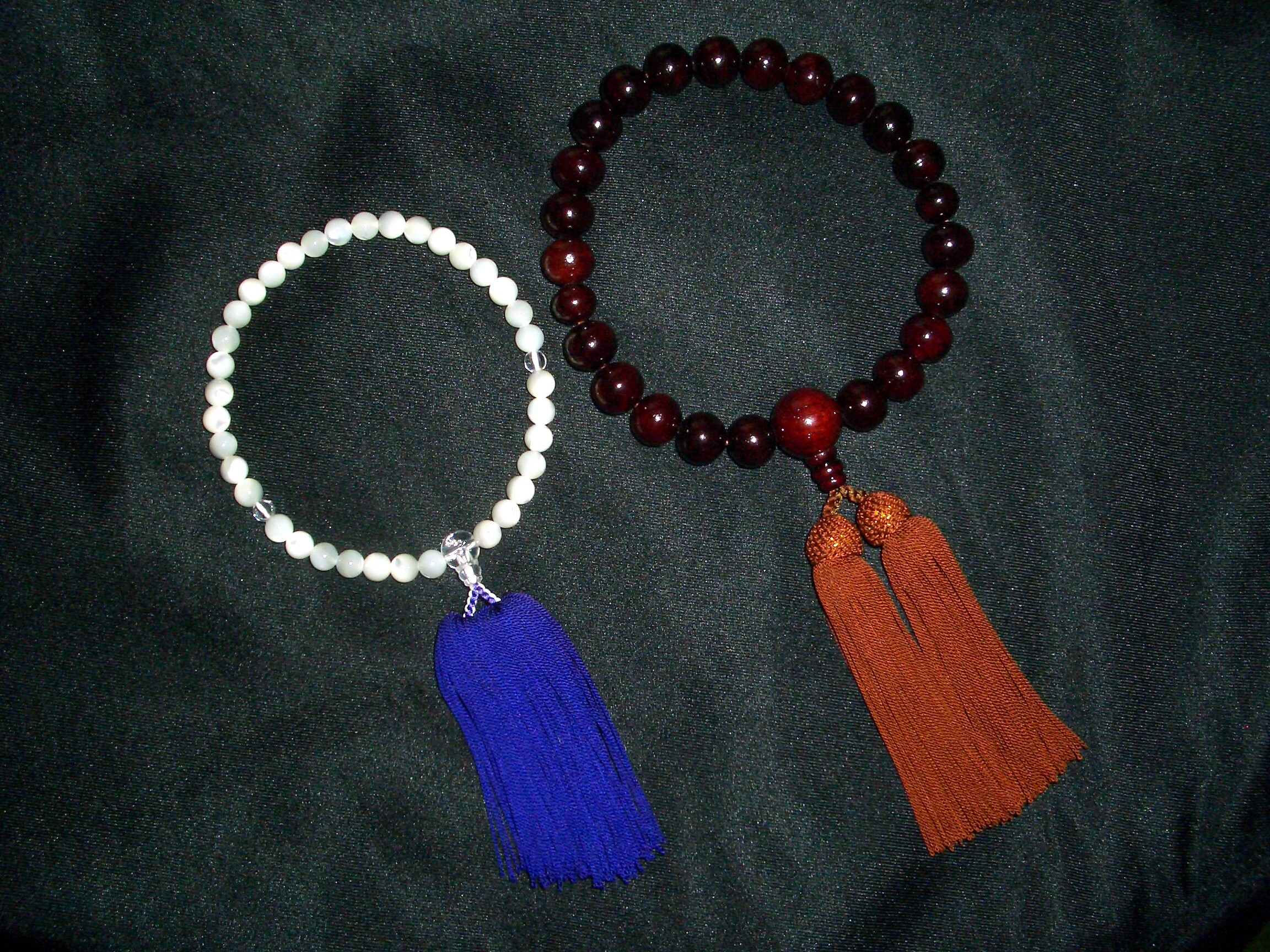 片手念珠（左・女性用、右・男性用）